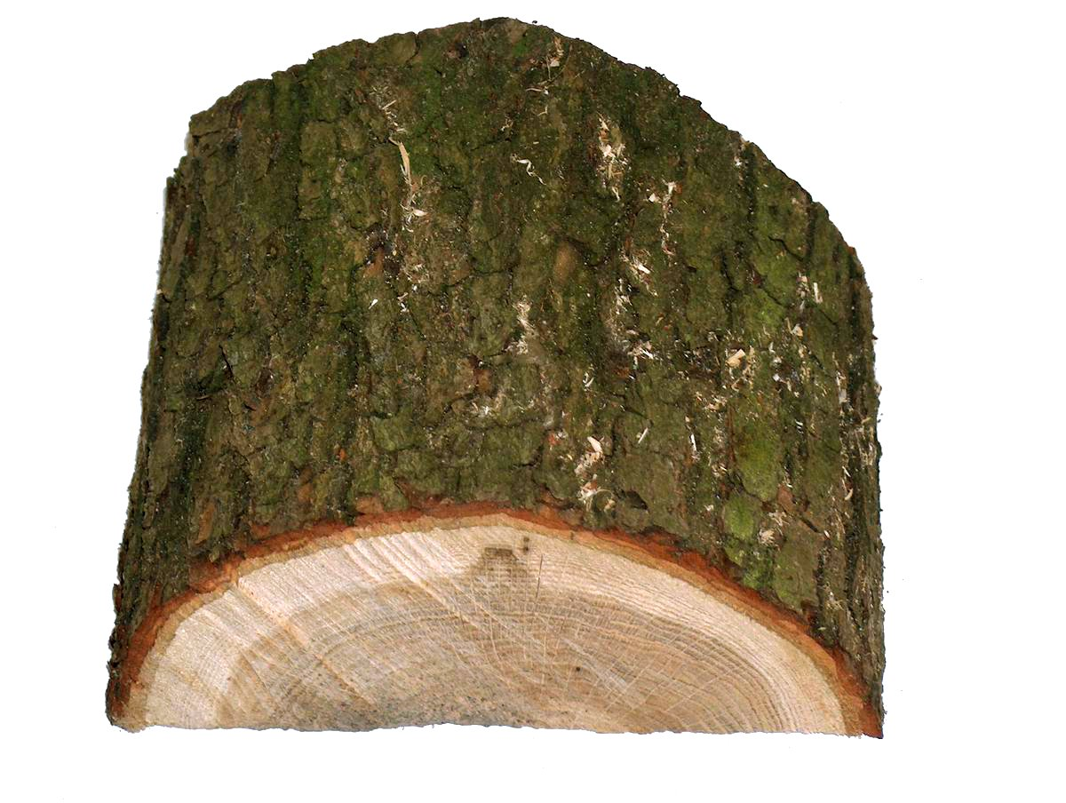 Rinde und Holz der Stieleiche (ca. 30 Jahre alt)